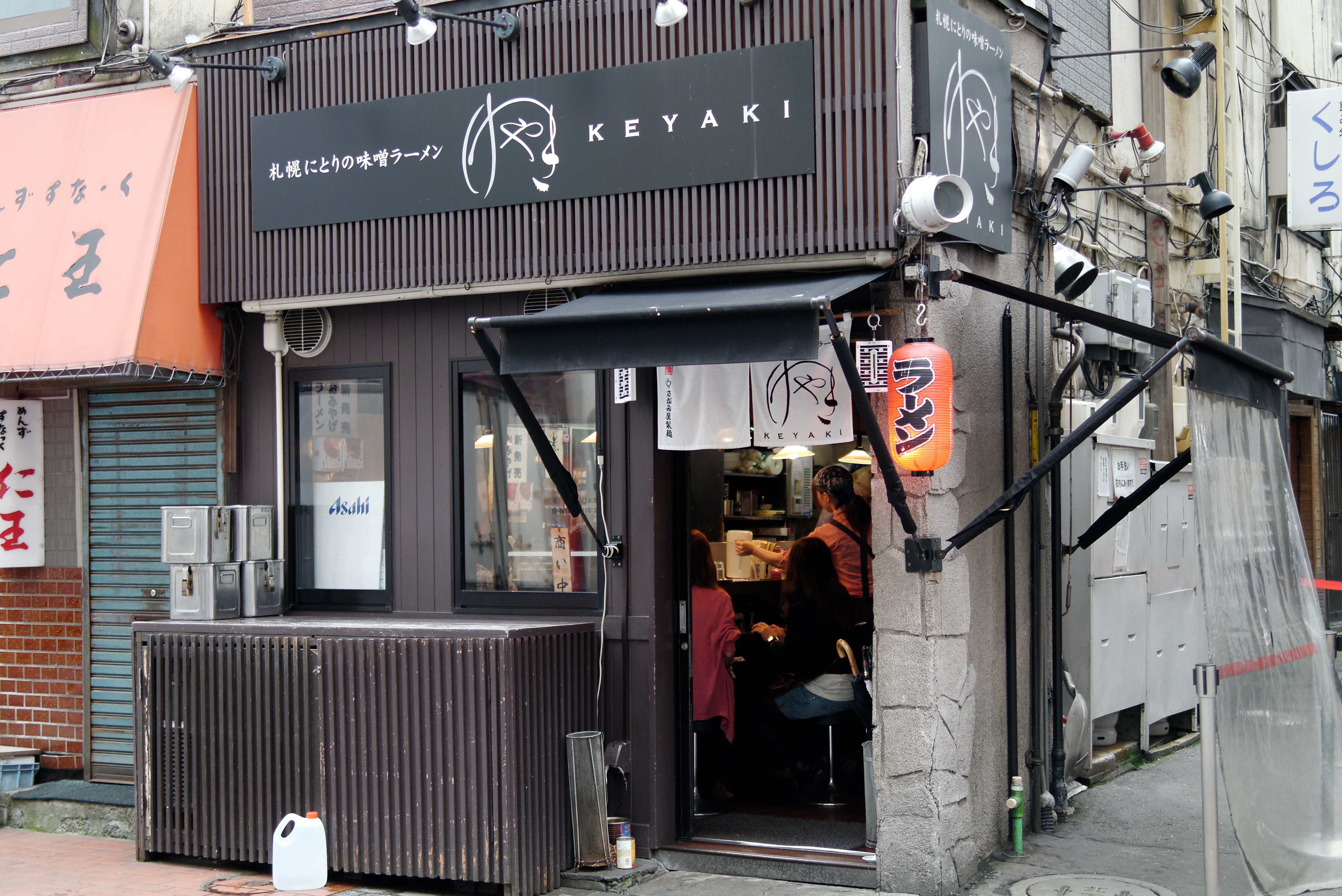 P1110263_DxO